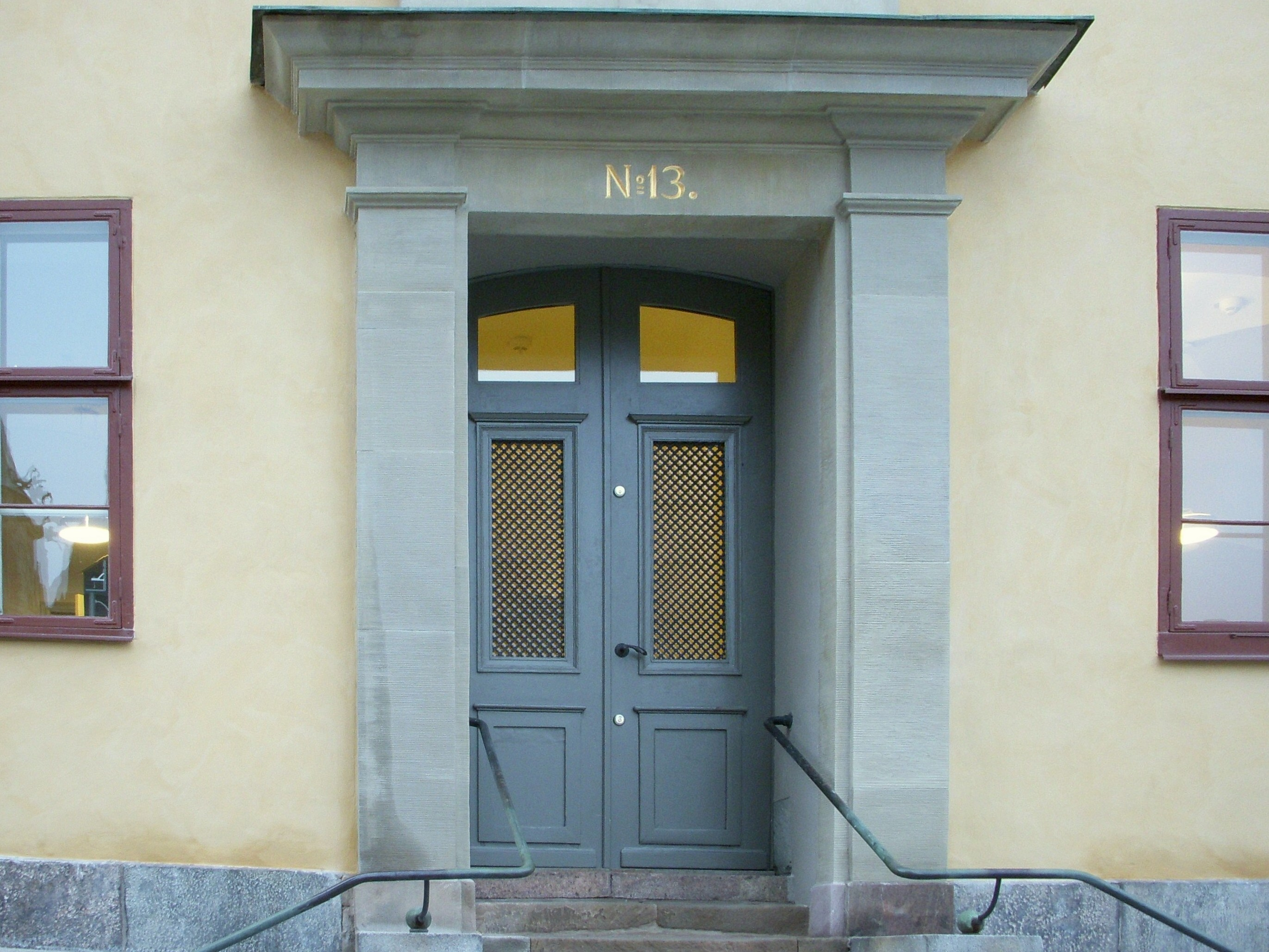 Kammarrättens hus entré från Birger jarls torg